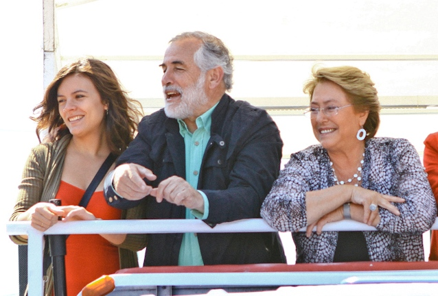 La Florida 02/11/2013